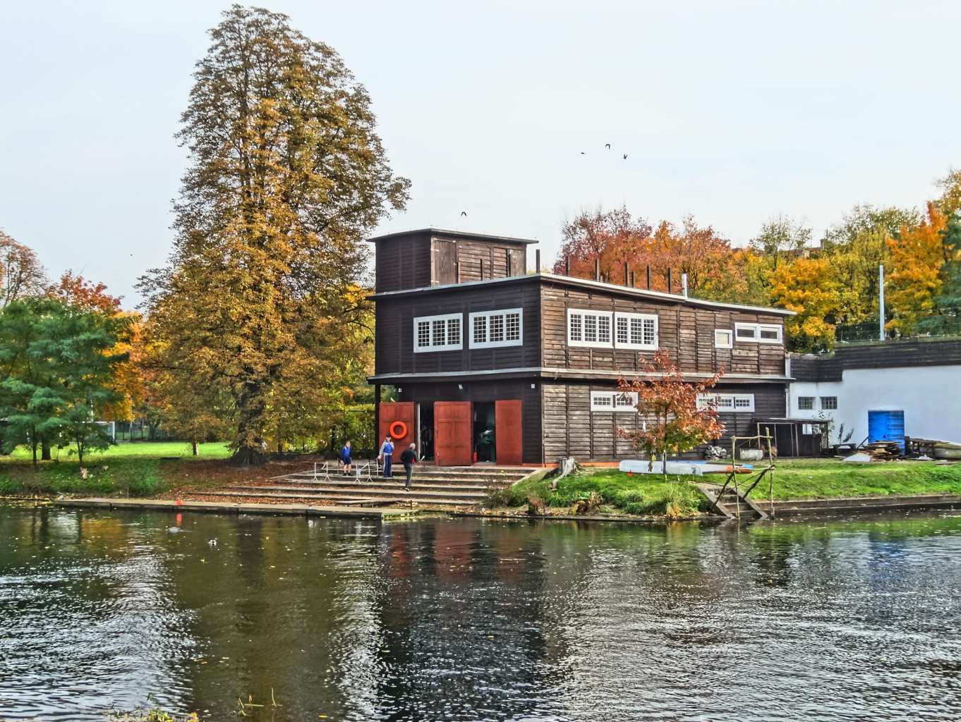 Przystań wioślarsko-kajakarska na Babiej Wsi w Bydgoszczy, użytkowana m.in. przez sekcję turystyki wodnej Kujawsko-Pomorskiej Szkoły Wyższej